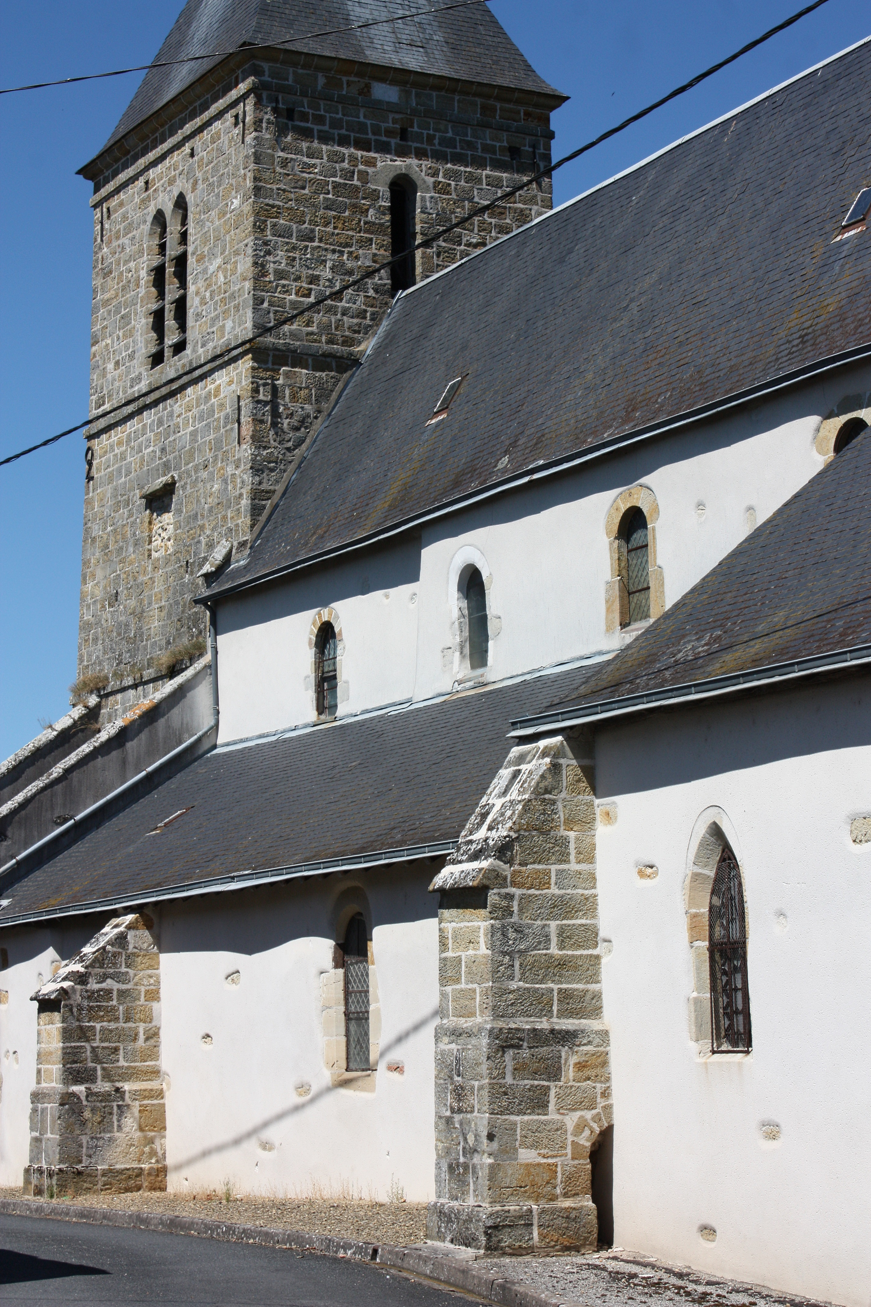 Maray - Eglise Saint-Aignan